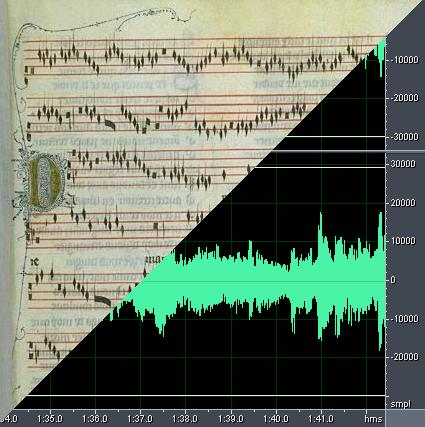 Imagen que muestra la evolución de la música